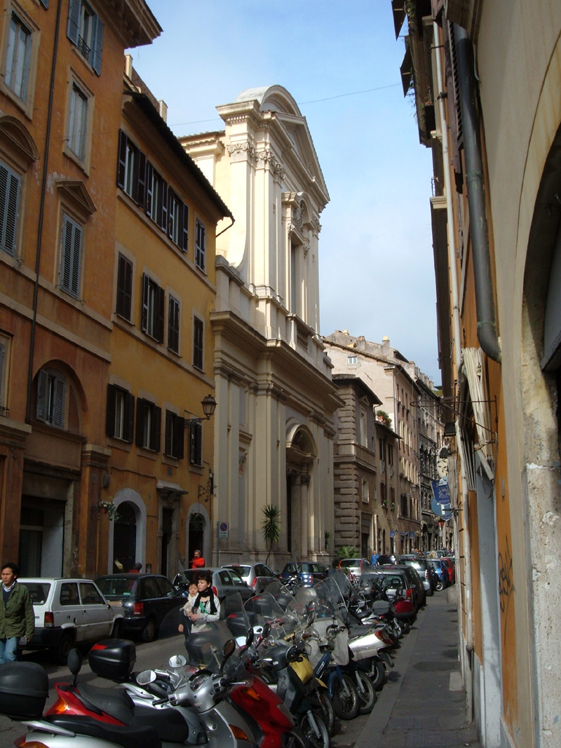 Chiesa di Santa Lucia del Gonfalone, a Roma, nel Rione Regola.